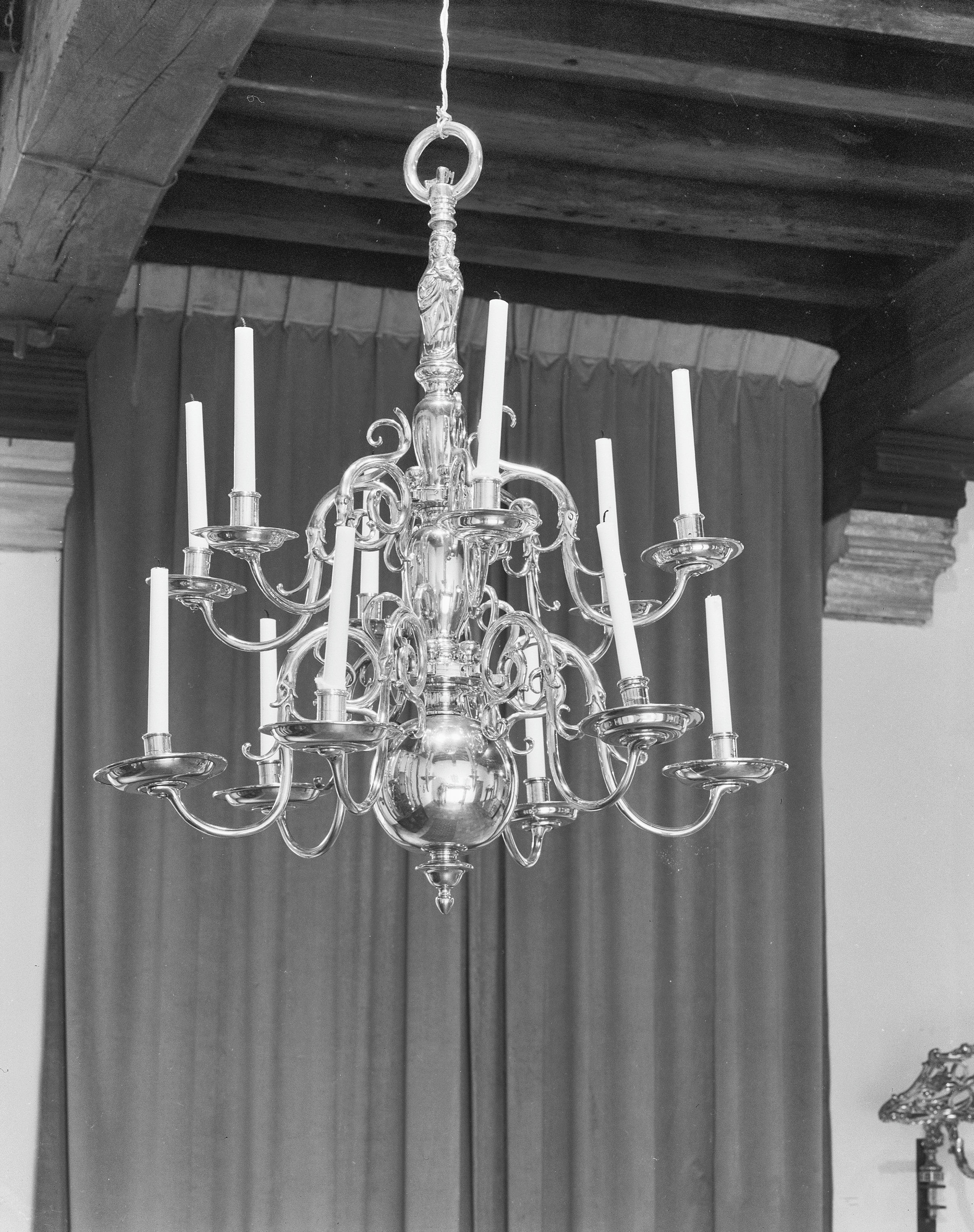 Oud Kath. Kerk: kaarsenkroon